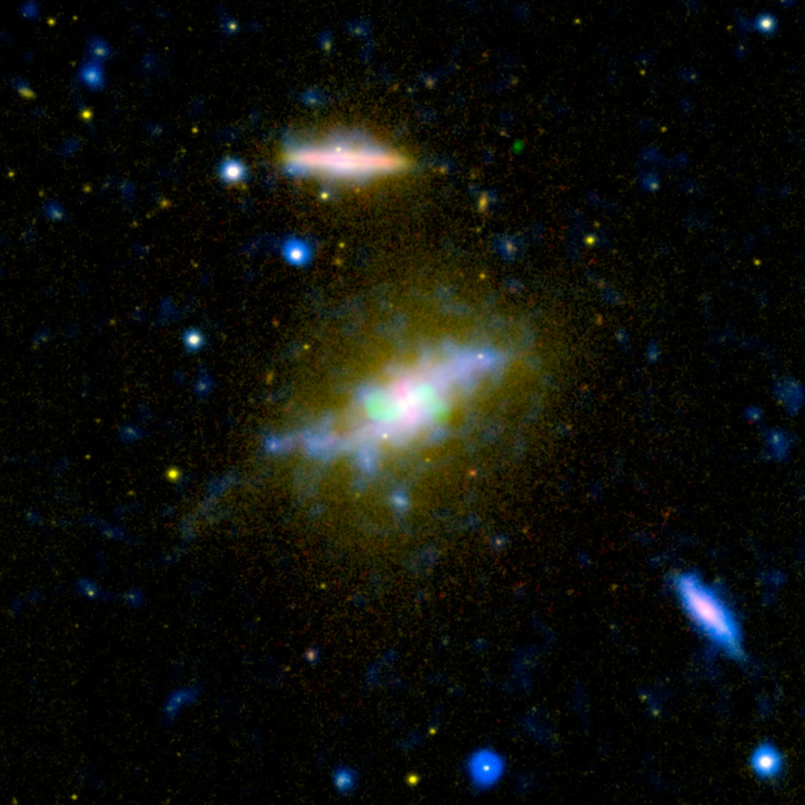 Galaktyka NGC 3801. Złożenie zdjęć wykonanych w świetle widzialnym, ultrafiolecie i w zakresie fal radiowych.